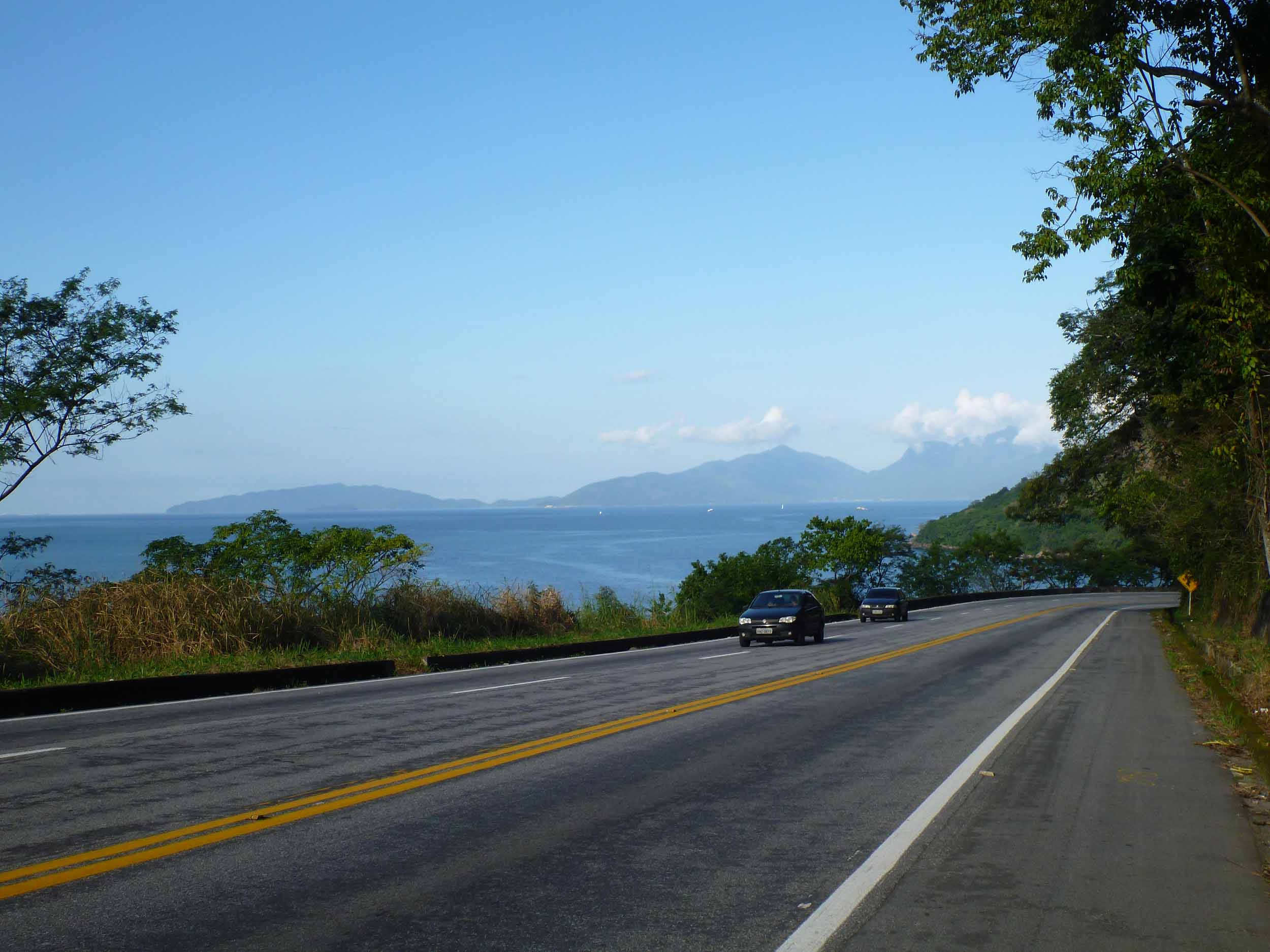 La BR-101 a su paso por el estado de Rio de Janeiro, Brasil.